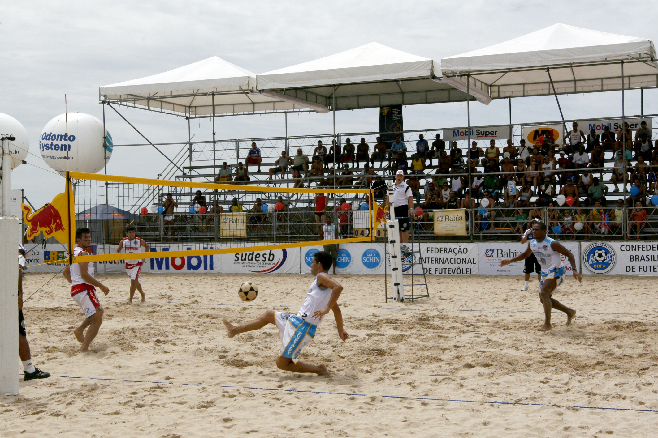 Governador Jaques Wagner participa da final do Futevôlei Foto: Roberto Viana/AGECOM